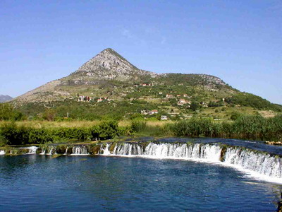 Brdo kraj Klobuka,Ljubuški